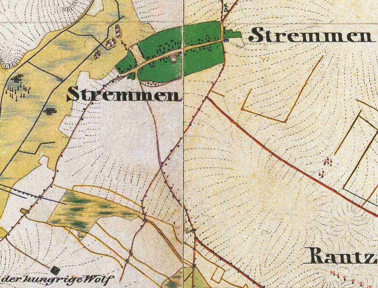 Stremmen, Ortsteil der Gemeinde Tauche, Lkr. Oder-Spree, Brandenburg, Ausschnitt aus den Urmesstischblättern 3850 Kossenblatt und 3851 Beeskow, beide von 1846